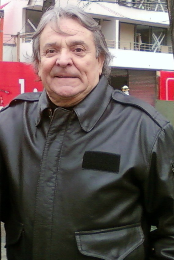 Humorista chileno Coco Legrand.